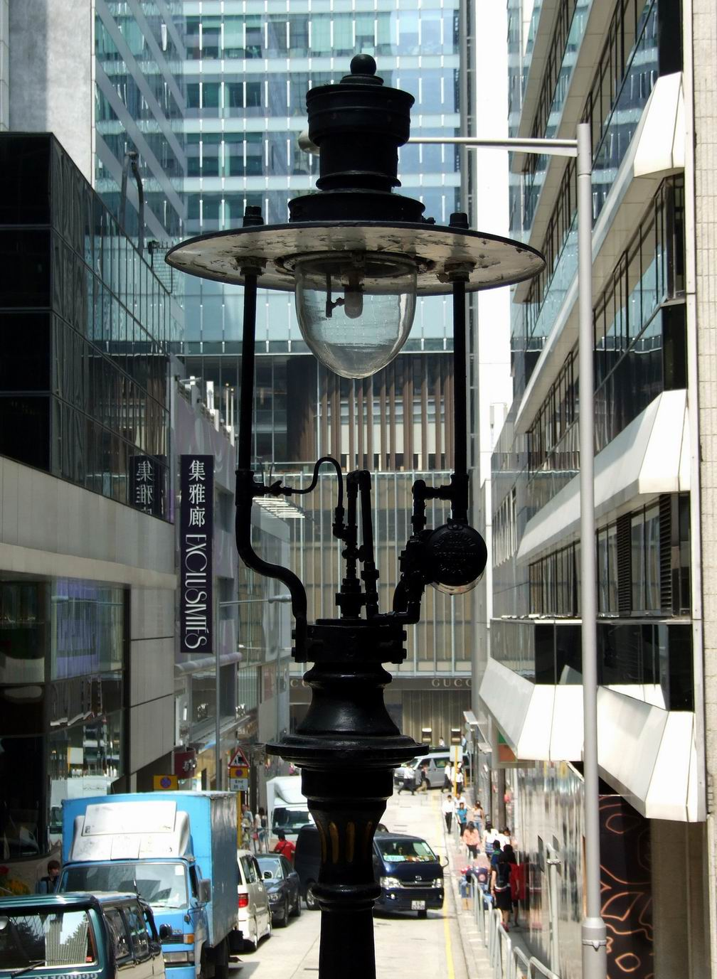 煤氣燈大特寫